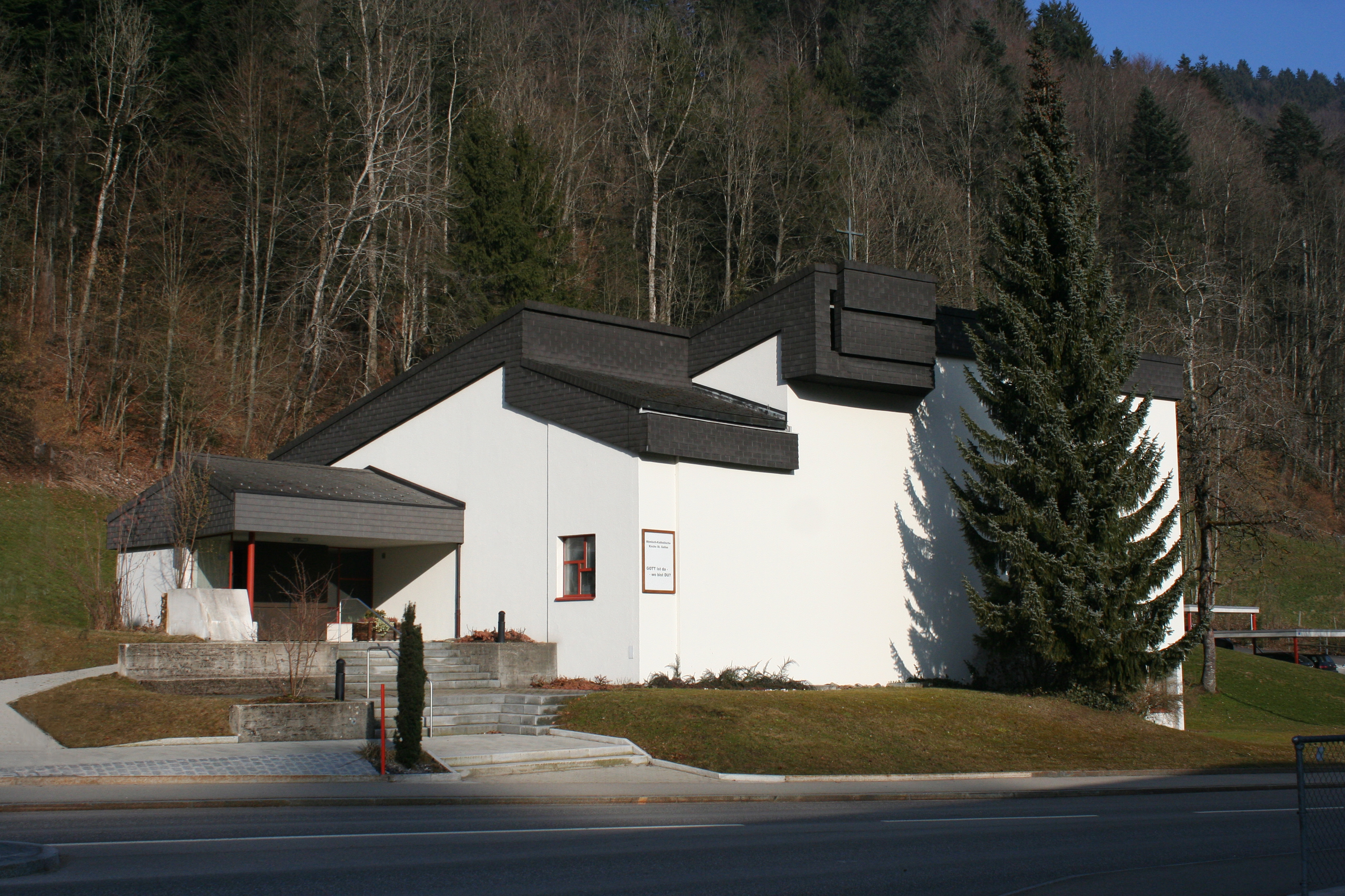 Römisch-katholische Kirche St. Gallus Fischenthal ZH, Aussenansicht von Süden